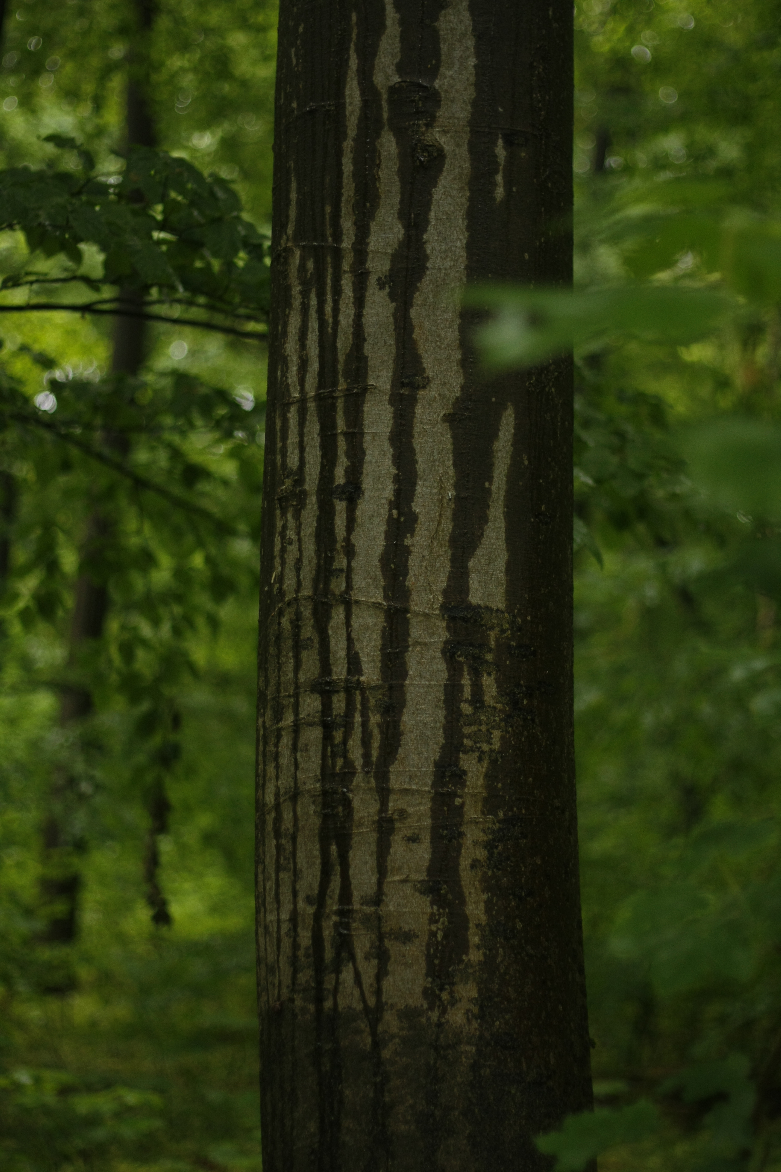 Stammabfluss von einer Rot-Buche in Thüringen nach einem Gewitterschauer. von Martin Roggenbuck, 2016